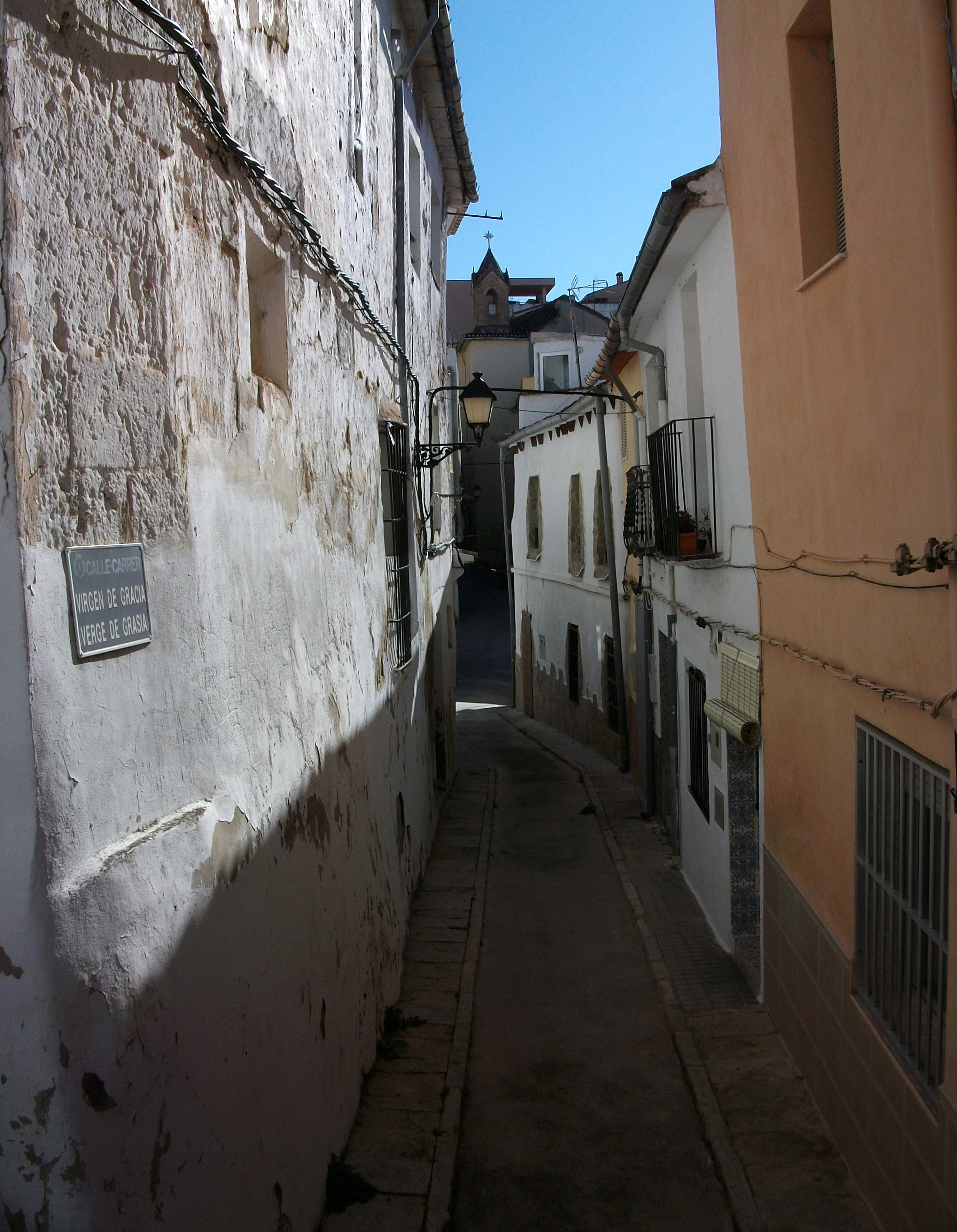 Carrer de la Verge de Gràcia d'Albaida.